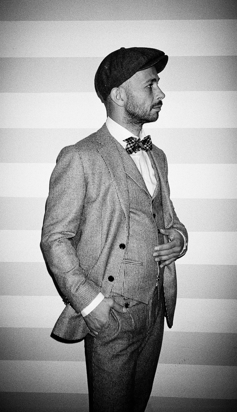 Ata Bozaci, Portrait